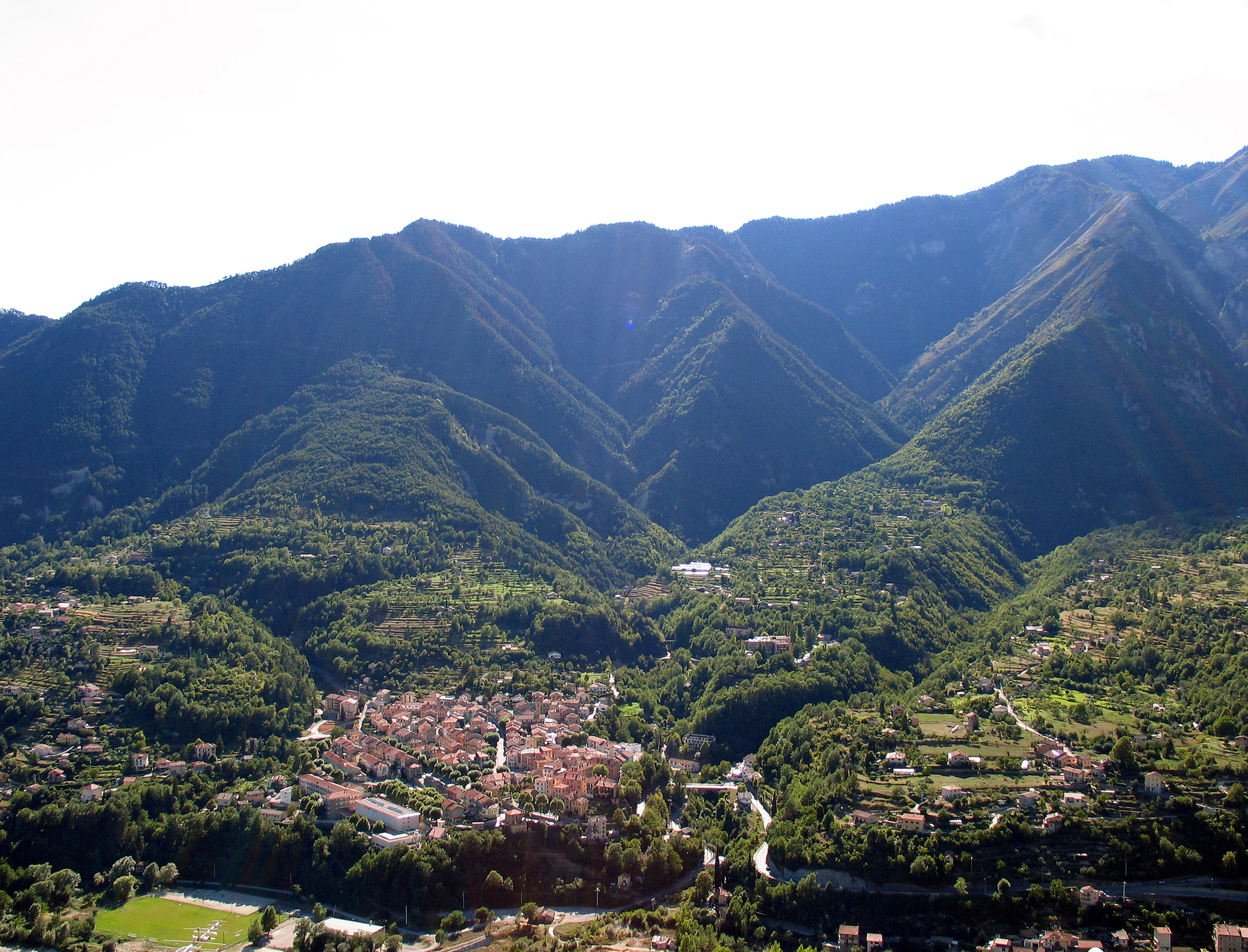 Le nouveau village de Roquebillière, PACA, France